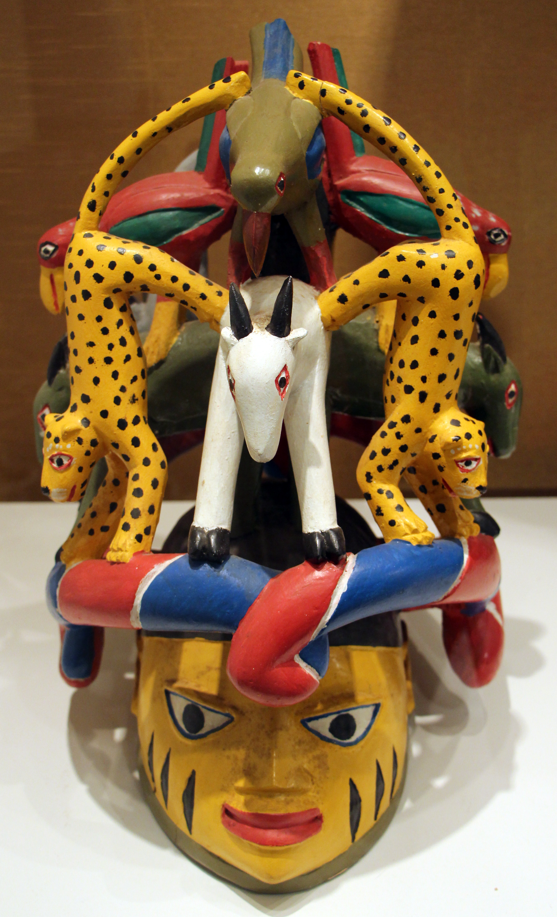 Museu Afro Brasil